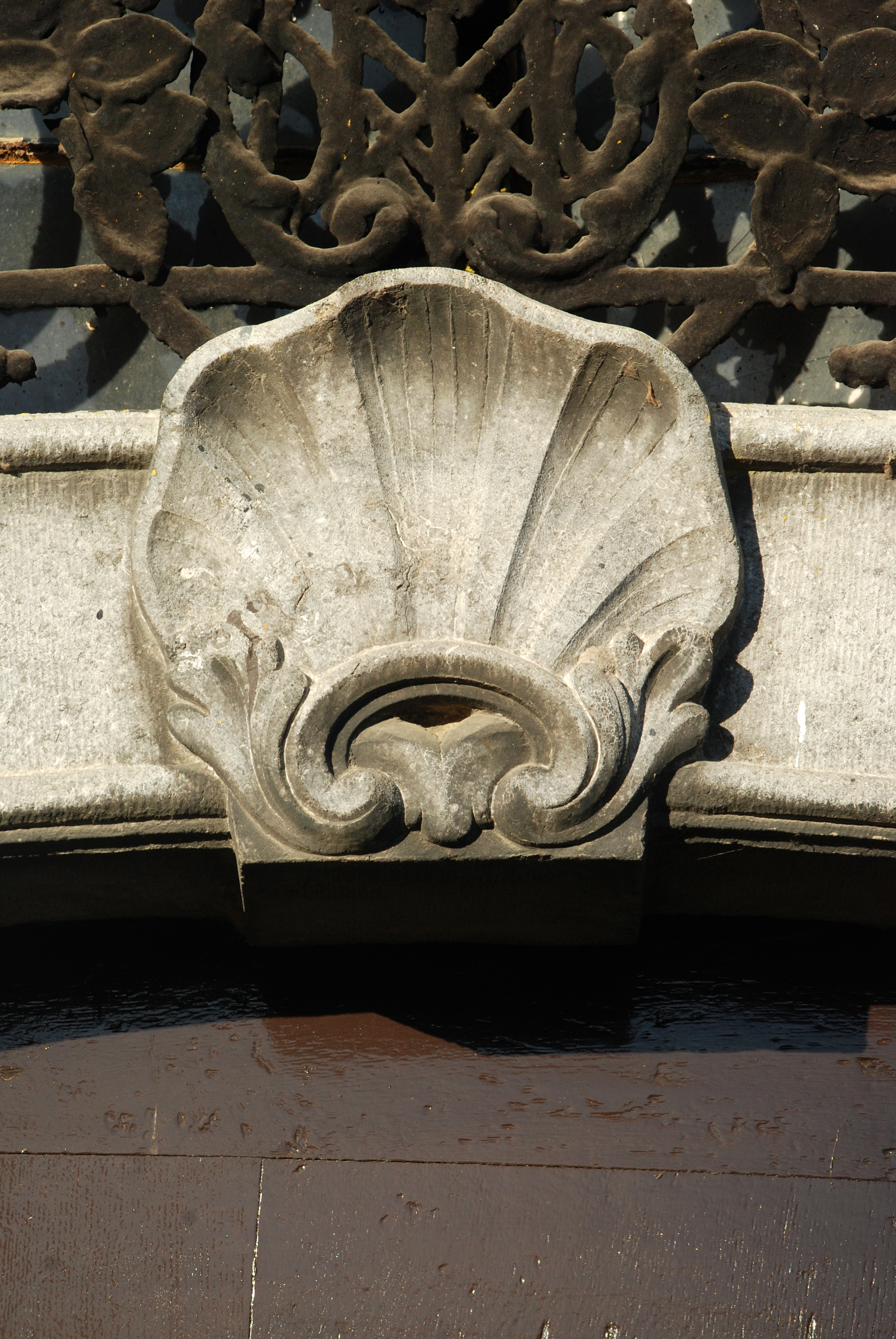 Belgique - Brabant wallon - Chapelle Notre-Dame des Affligés de Ways